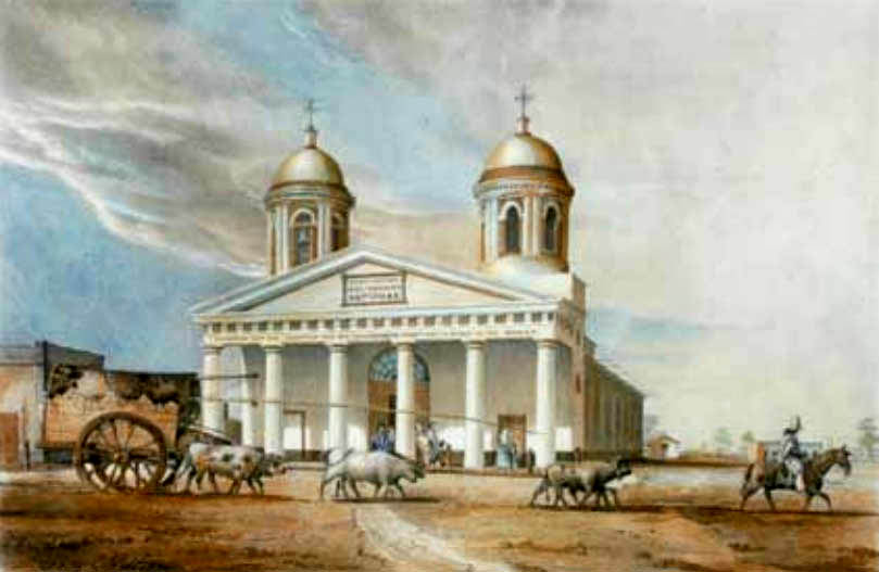 Templo de San José de Flores en el dibujo de Carlos E. Pellegrini de 1841. Fué construído según los planos del arquitecto Felipe Senillosa, inagurado el 11 de diciembre de 1831, con asistencia del gobernador Rosas.